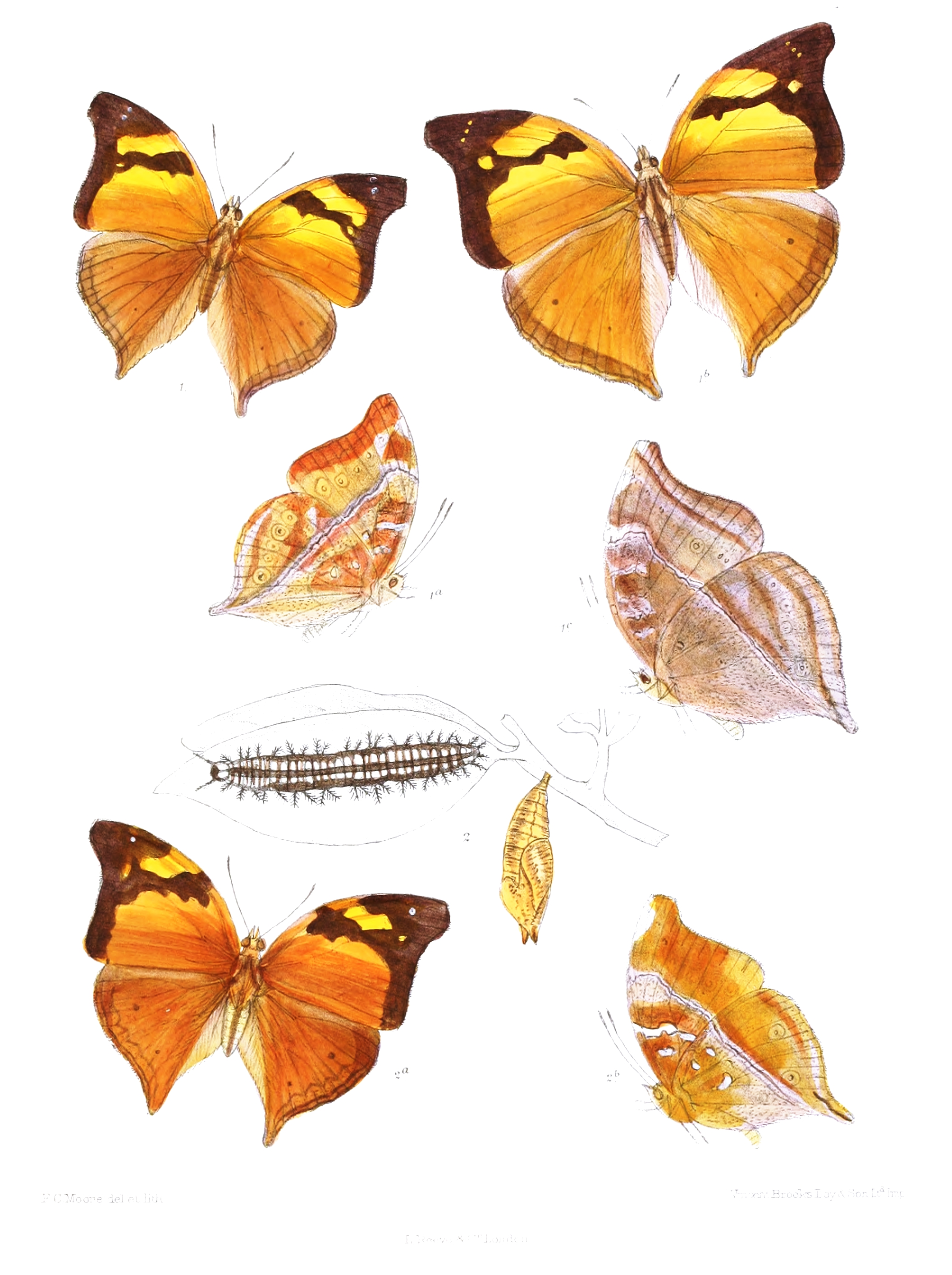 Doleschallia indica = D. bisaltide indica